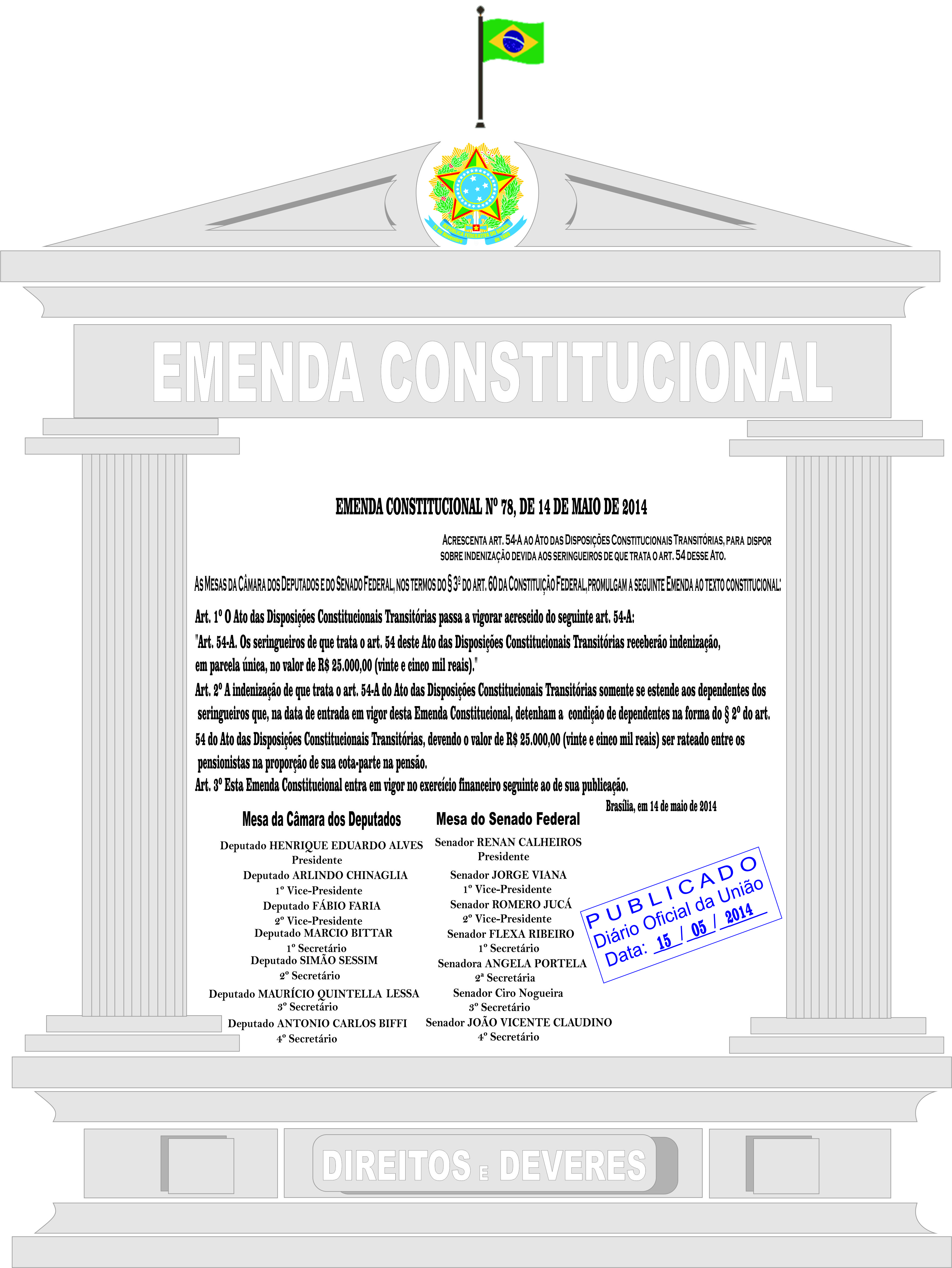 Pórtico com o texto da Emenda Constitucional nº 78, de 14 de maio de 2014 com os membros das mesas da Câmara dos Deputados e do senado FederalMesa da Câmara dos Deputados Deputado HENRIQUE EDUARDO ALVES Presidente Deputado ARLINDO CHINAGLIA 1º Vice-Presidente Deputado FÁBIO FARIA 2º Vice-Presidente Deputado MARCIO BITTAR 1º Secretário Deputado SIMÃO SESSIM 2º Secretário Deputado MAURÍCIO QUINTELLA LESSA 3º Secretário Deputado ANTONIO CARLOS BIFFI 4º Secretário Mesa do Senado Federal Senador RENAN CALHEIROS Presidente Senador JORGE VIANA 1º Vice-Presidente Senador ROMERO JUCÁ 2º Vice-Presidente Senador FLEXA RIBEIRO 1º Secretário Senadora ANGELA PORTELA 2ª Secretária Senador Ciro Nogueira 3º Secretário Senador JOÃO VICENTE CLAUDINO 4º Secretário